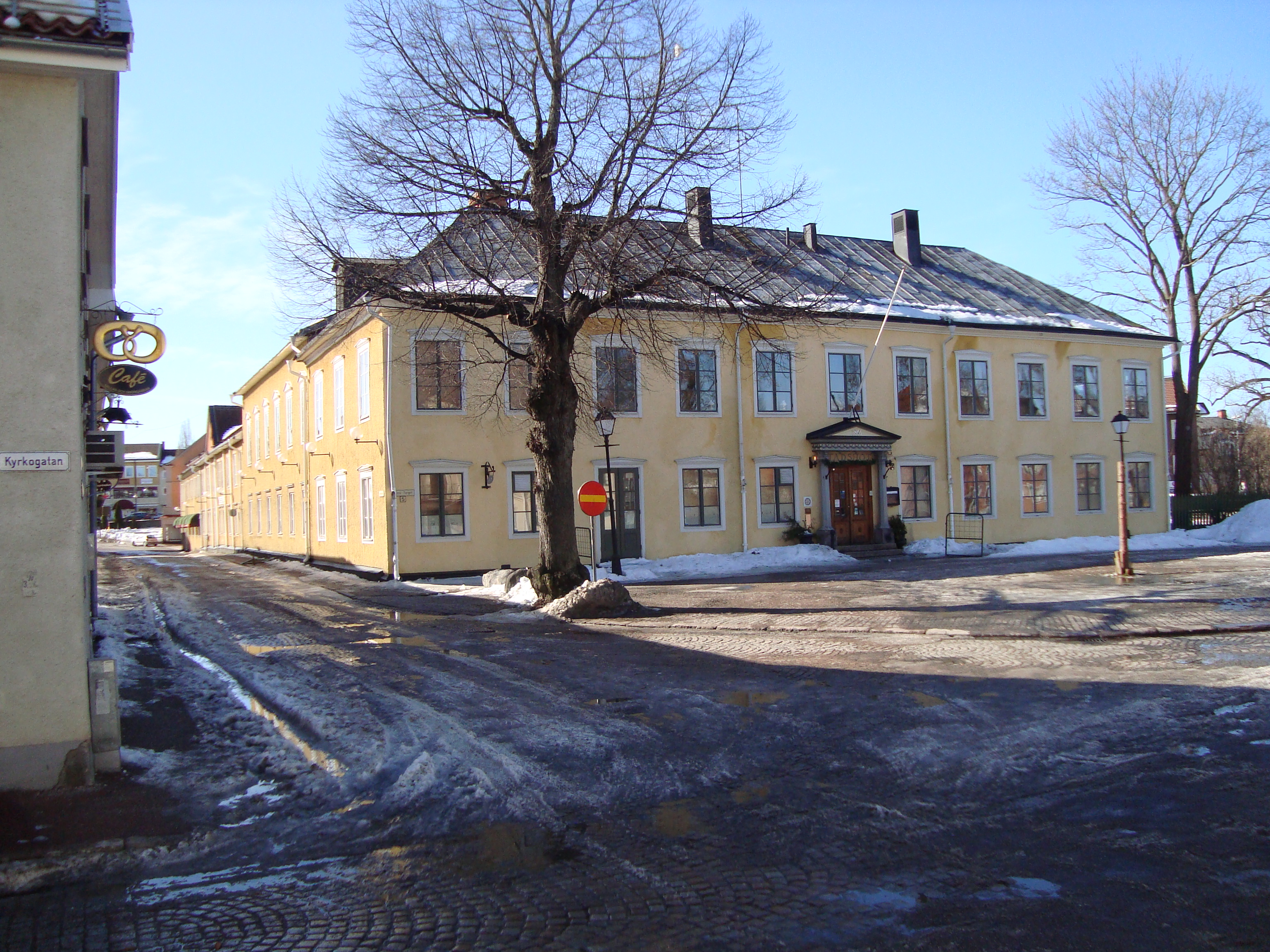 Stadshotellet, Hedemora, Sverige